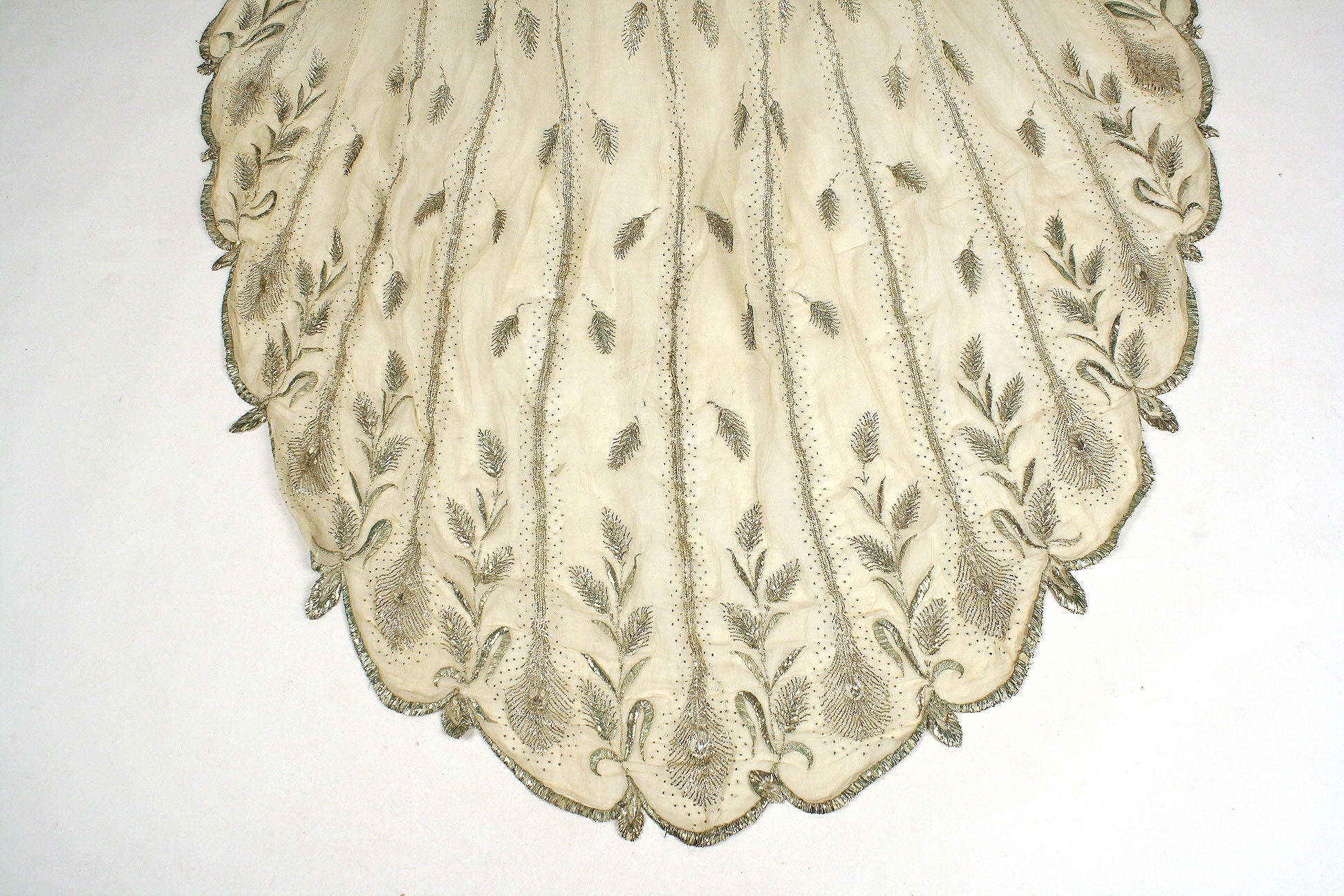 French; Evening dress